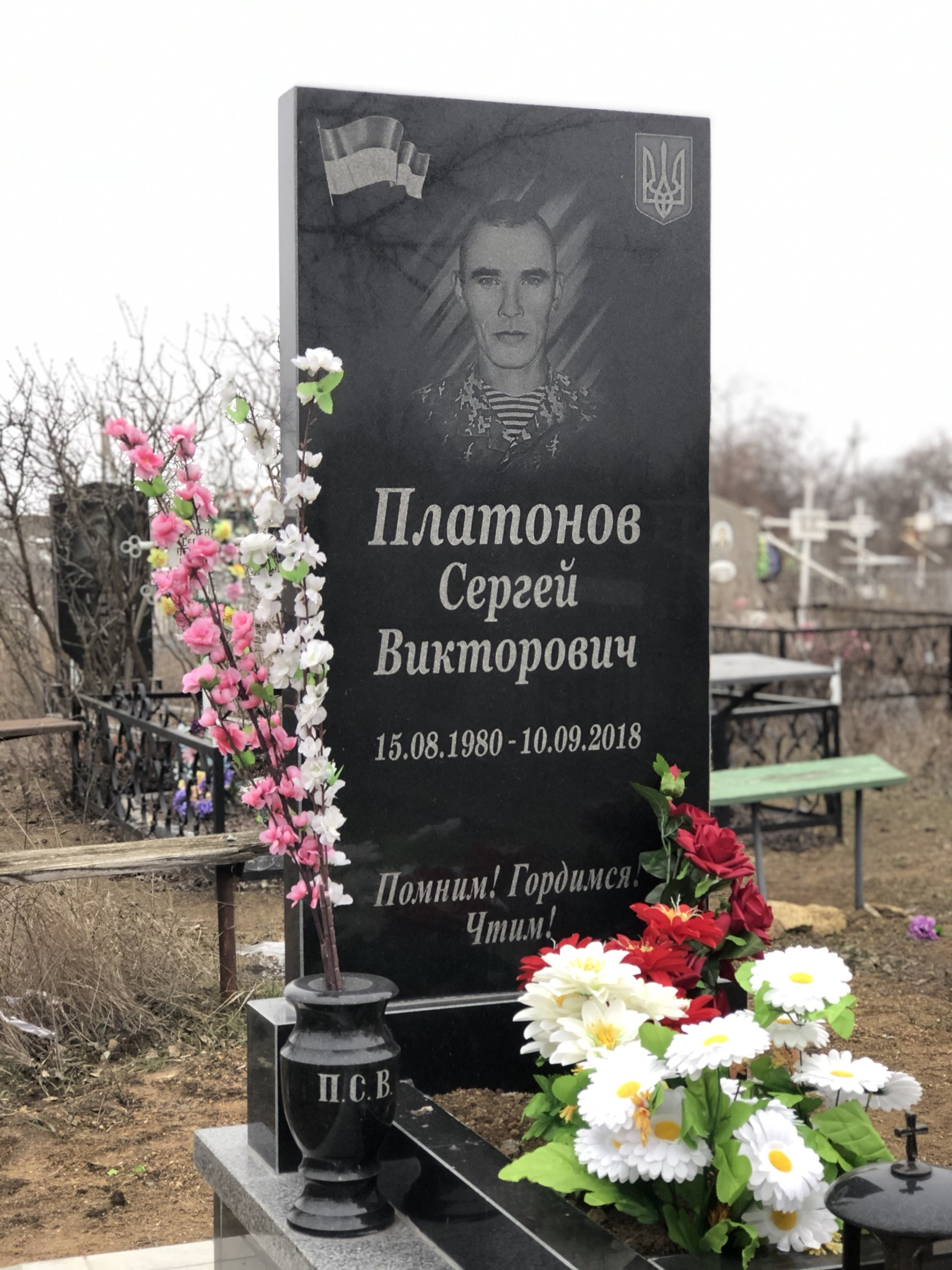 Фото пам’ятника Платонову Сергію Вікторовичу